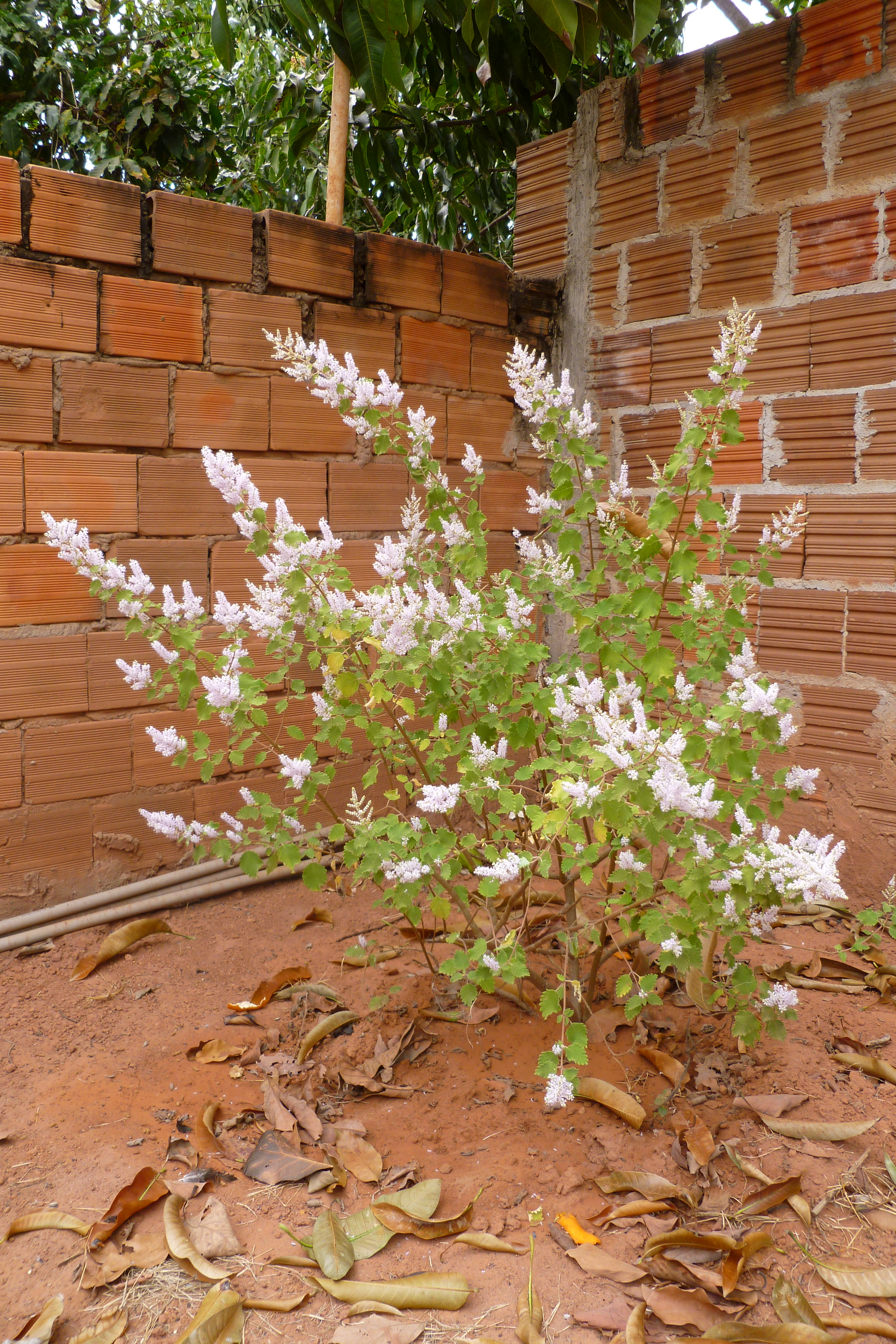 Arbeto de Tetradenia riparia, en Montezuma, MG, Brazilo.